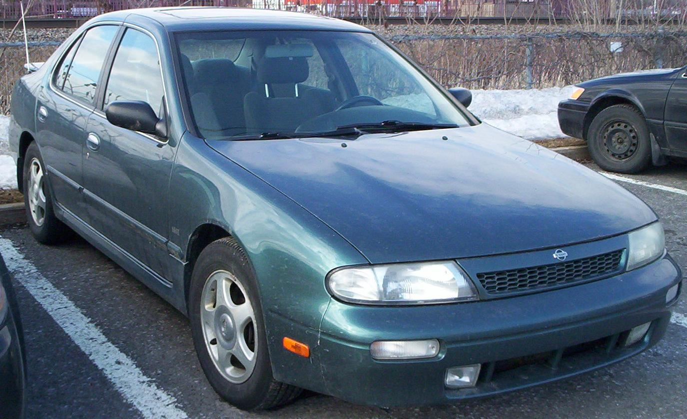 1993-1994 Nissan Altima